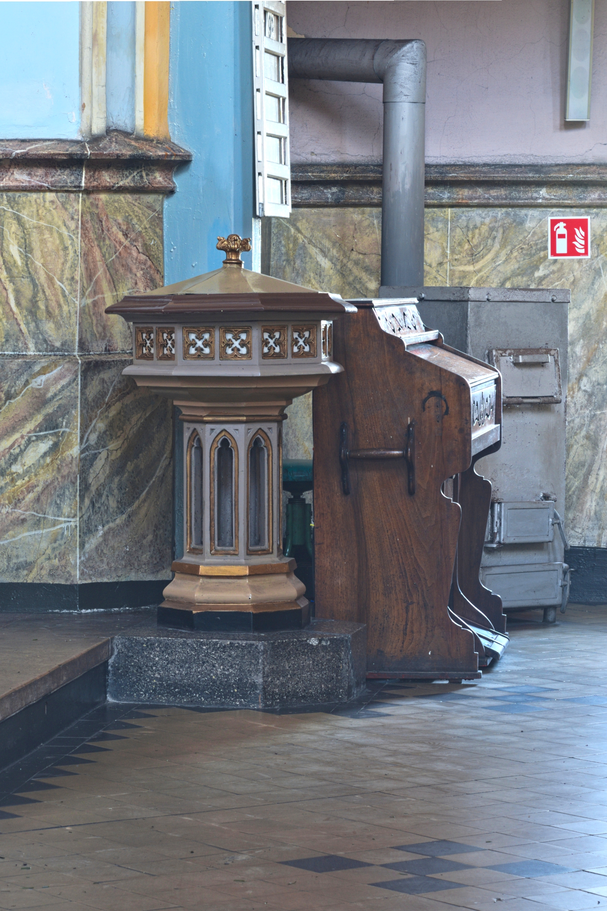 chrzcielnica, tablica na numery pieśni, fisharmonia i piec w kościele im. Elżbiety w Chorzowie, widok z zewnątrz przez okno świątyni